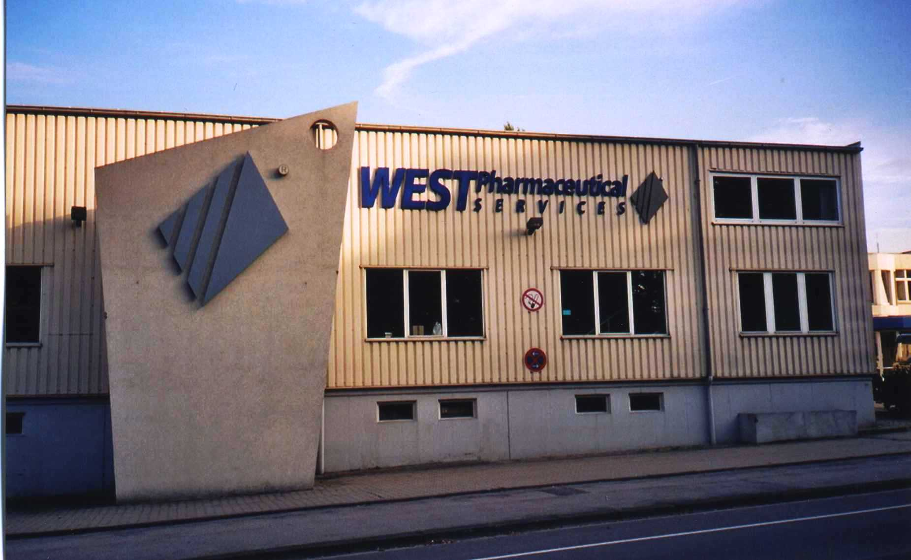 West Pharmaceutical Services in Eschweiler-Pumpe-Stich, Produktionsgebäude mit Firmenlogo